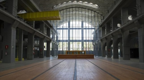 Tras dos años en Barcelona, llega a Madrid Sustainable Brands, el mayor movimiento global de sostenibilidad y negocios, que busca establecer un punto de encuentro y diálogo entre empresas, Administraciones y ciudadanía para abordar una forma de entender la actividad empresarial en la que, sin descuidar la rentabilidad, ésta tenga un impacto social y medioambiental positivo. Y, en última instancia, conduzca a modelos sostenibles de comercio y consumo. La cita será en La N@ve los próximos 8 y 9 de mayo. Un día antes, el 7, la sostenibilidad tomará el paseo del Prado en una jornada de ocio para toda la familia, el Sustainable Sunday, en la que se desarrollarán más de 30 iniciativas, con las que, por ejemplo, aprender a cosechar un huerto en casa, disfrutar de una sesión de yoga multinivel, descubrir apps innovadoras, ver documentales y películas y asistir a un desfile de moda.